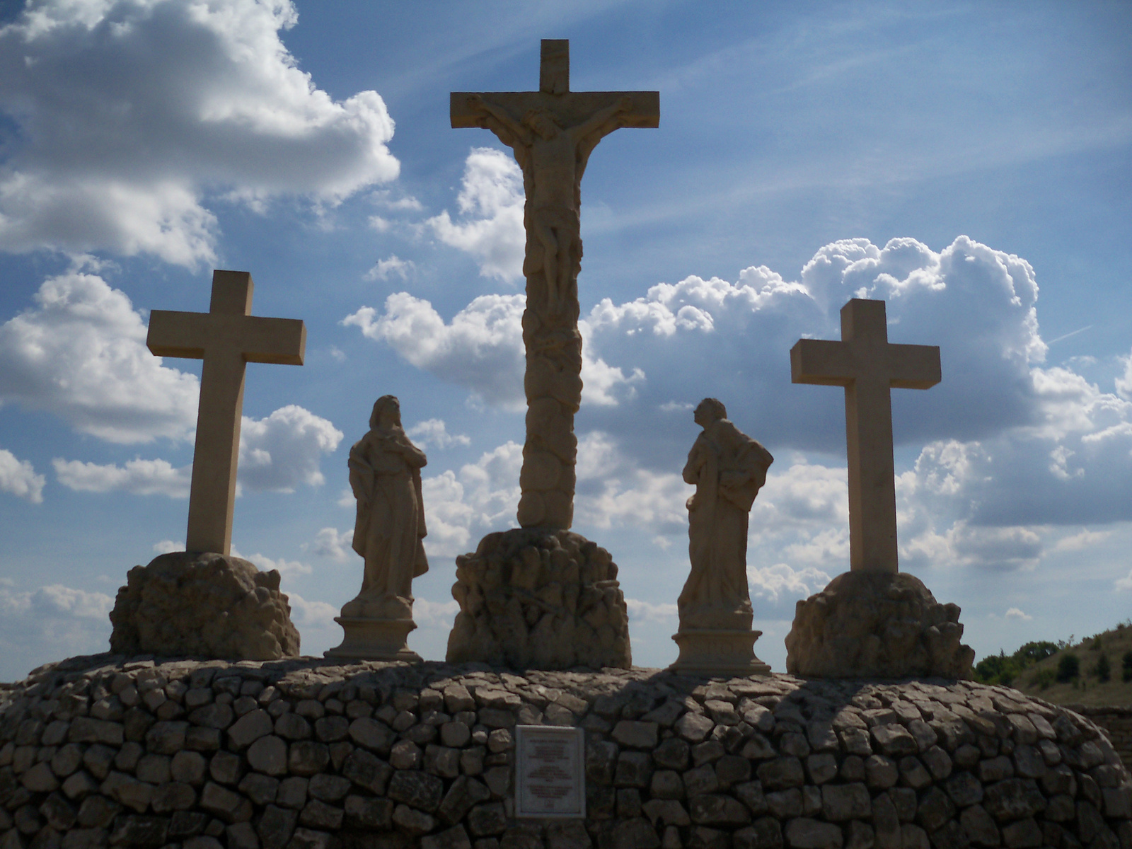 körítőfal (Bodajk, Kálvária u. 30.)